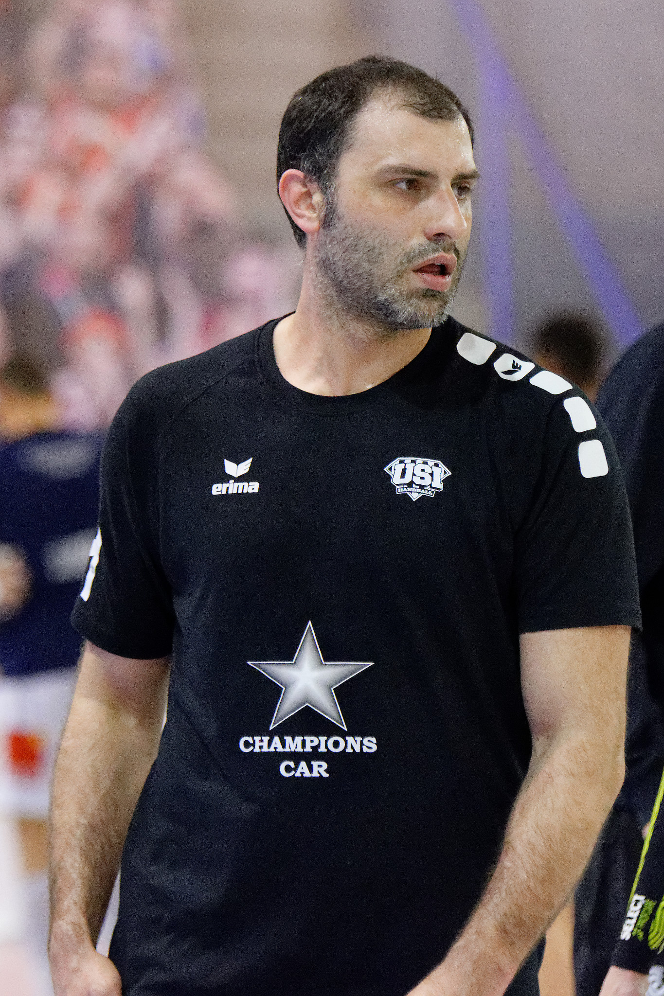 Ivry - Saint-Raphaël lors de la 19e journée du championnat de France de handball masculin le 23 mars 2016 au gymnase Auguste Delaune à Ivry sur Seine.